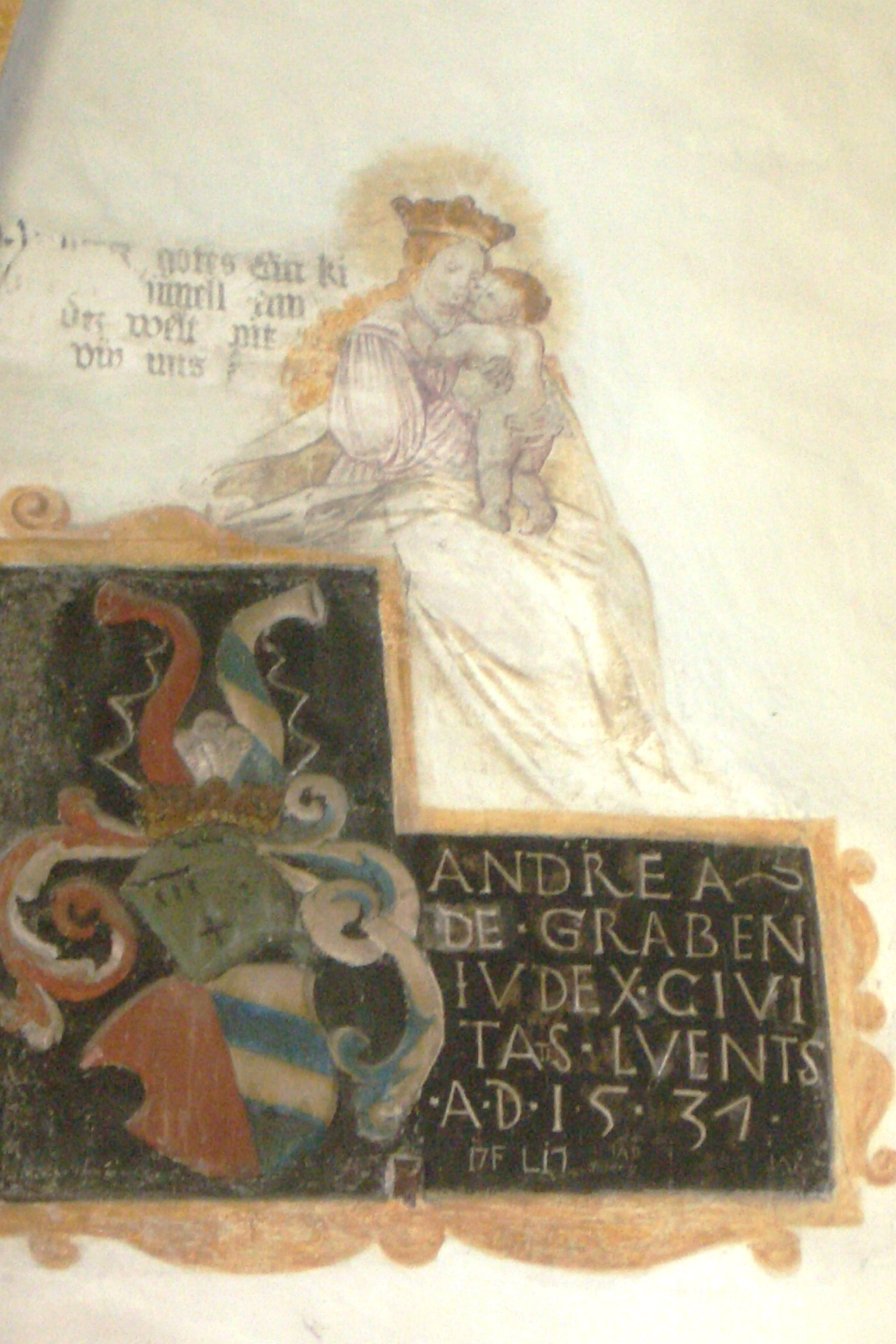 Het wapen van Andries von Graben, (15e eeuw), ridder en burggraaf van Ortenburg en Sommeregg Karinthië